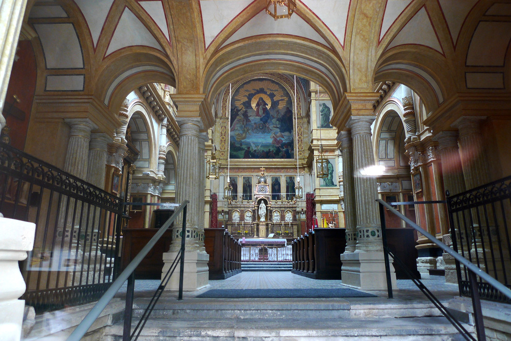 Mechitaristenkirche Wien Neubau